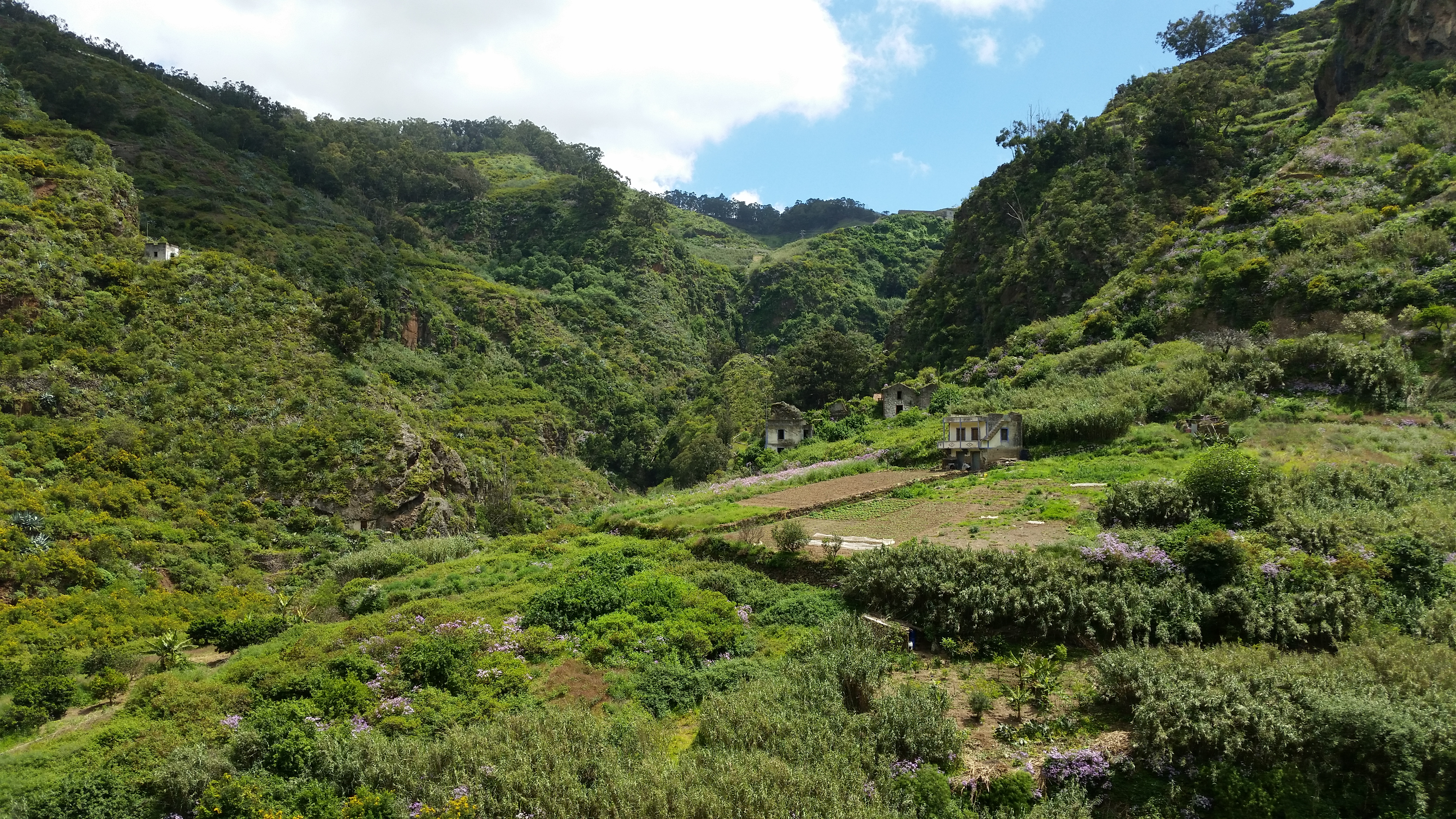 Azuaje This is a photography of a Special Area of Conservation in Spain with the ID: ES7010004. Natura2000 entry, EEA entry